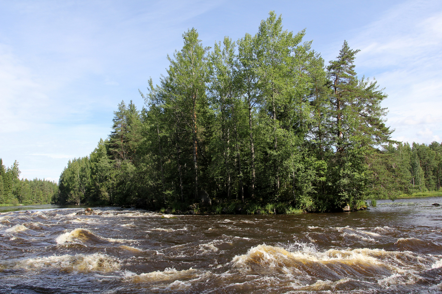 Äänekosken Luijankoski